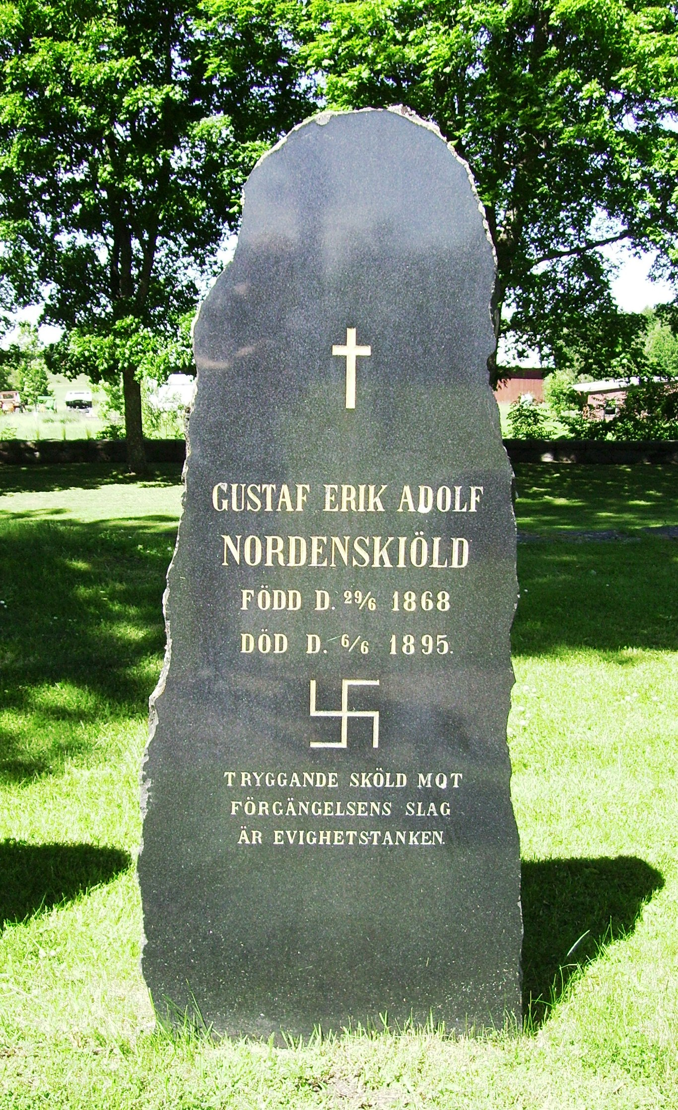 Picture of Gustaf Erik Adolf Nordenskiöld's grave at Västerljungs kyrkogård in Södermanland, Sweden.